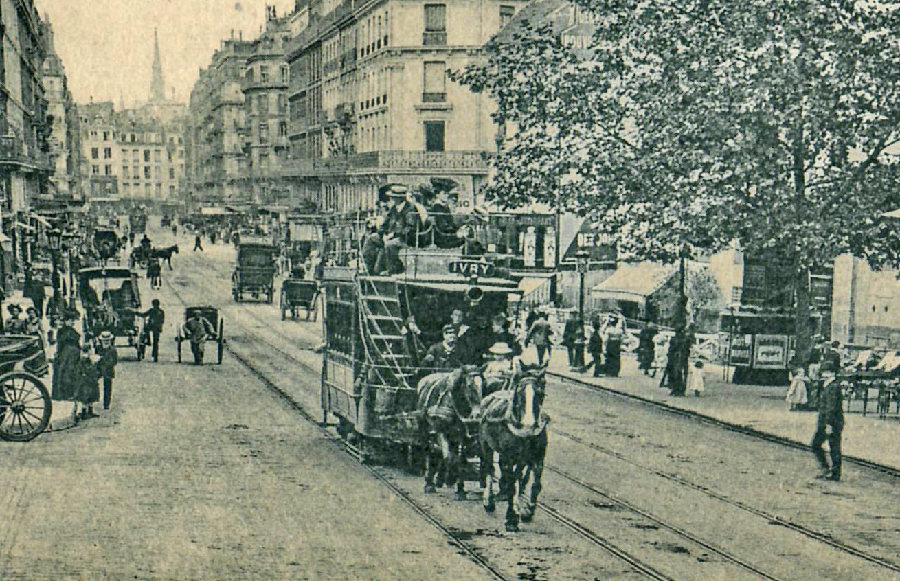 Carte postale ancienne éditée par ND n°1120 (détail) PARIS : La Rue Monge Gros plan sur un tramway hyppomobile à impériale de la CGO en direction d'Ivry L'exploitation des tramways hyppomobiles à Paris a cessé le 13 décembre 1913.